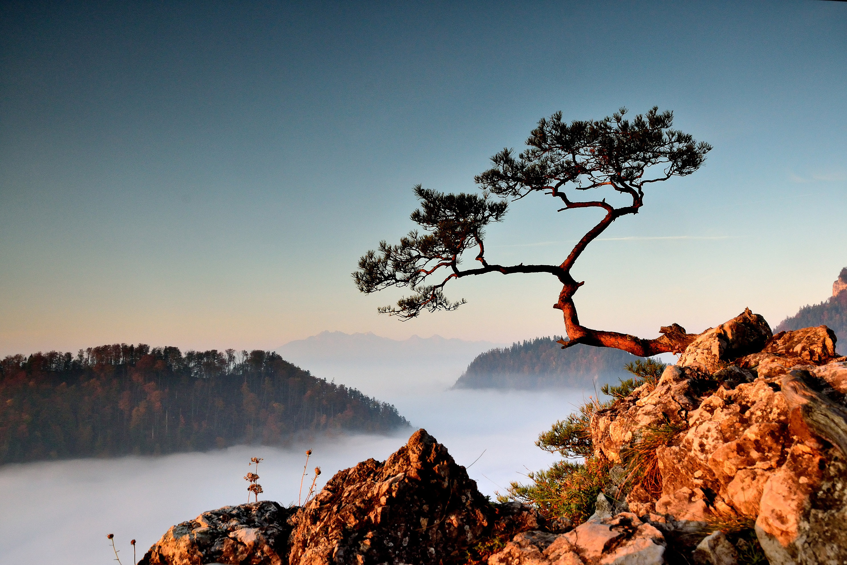 Obszar specjalnej ochrony ptaków Pieniny. This is a photography of Natura 2000 protected area with ID PLB120008